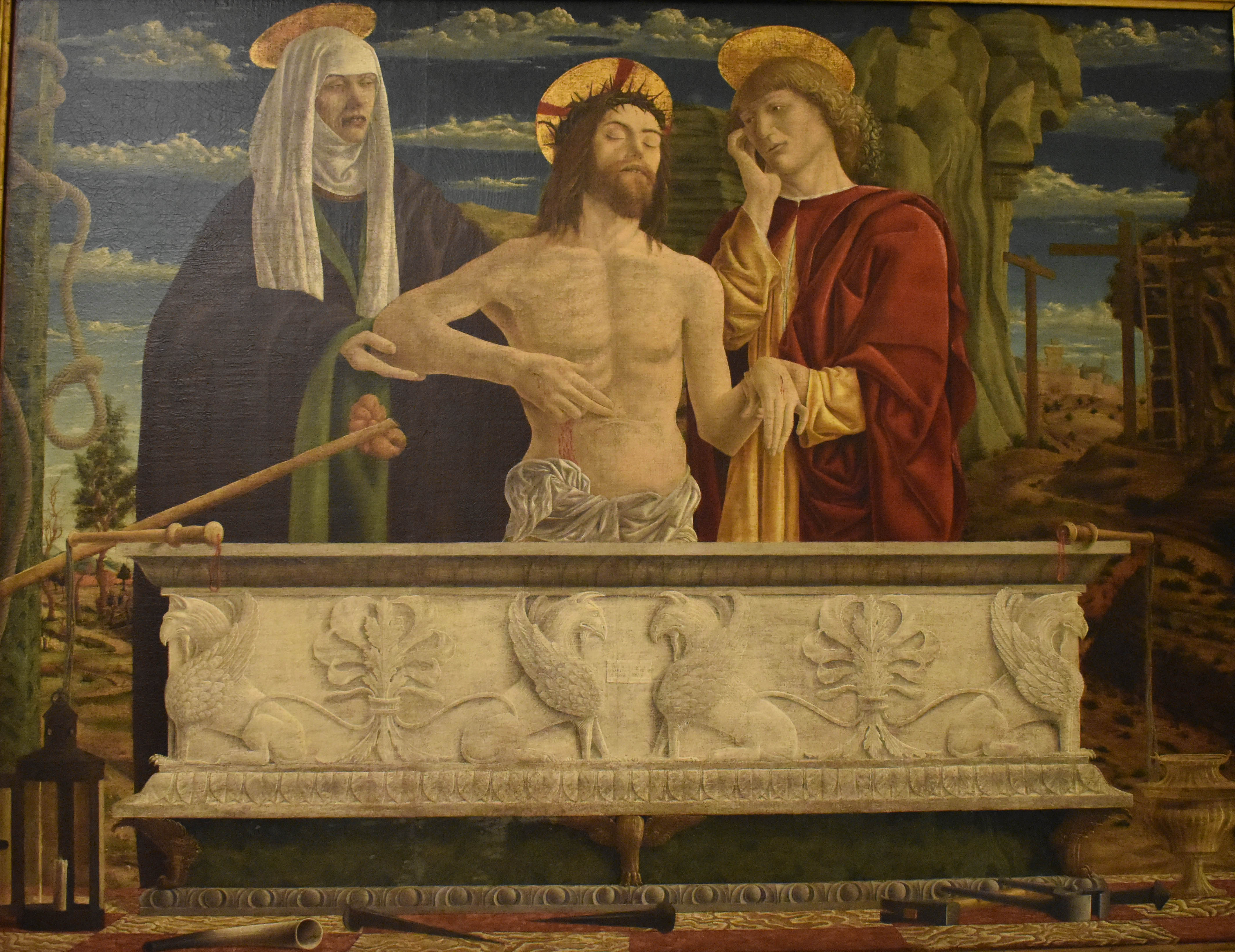 Bartolomeo Bonascia, Pietà, (1475-1495), Galleria Estense, Modena